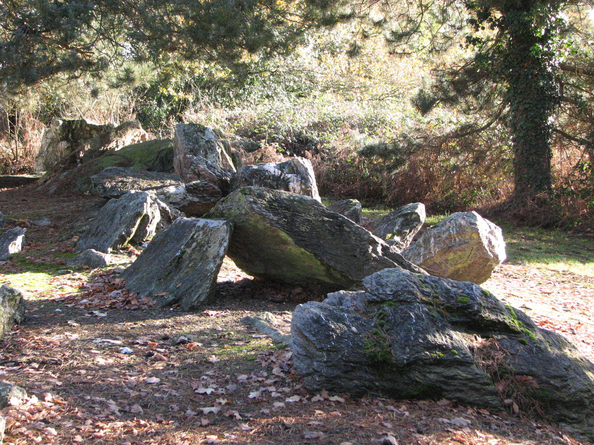 Allée couverte (mégalithe) du Grand Village, à Caro (Morbihan)